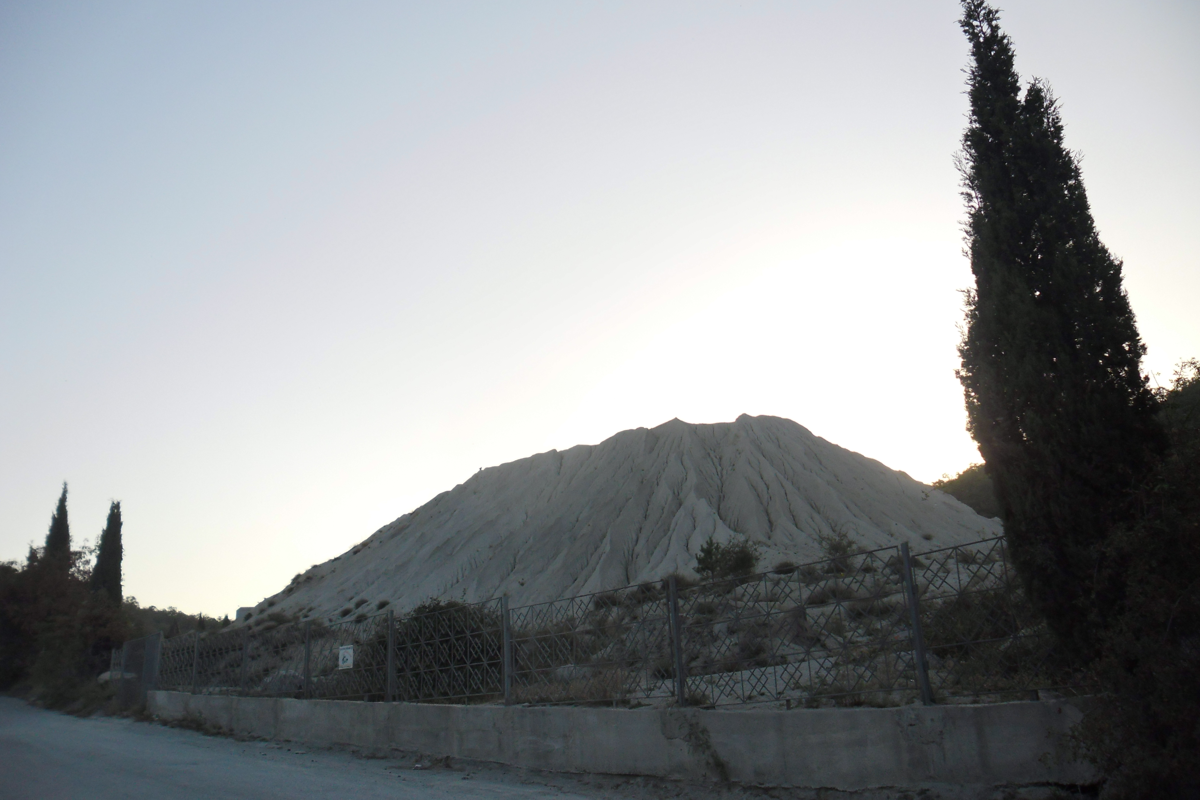 Шархинський кар'єр.